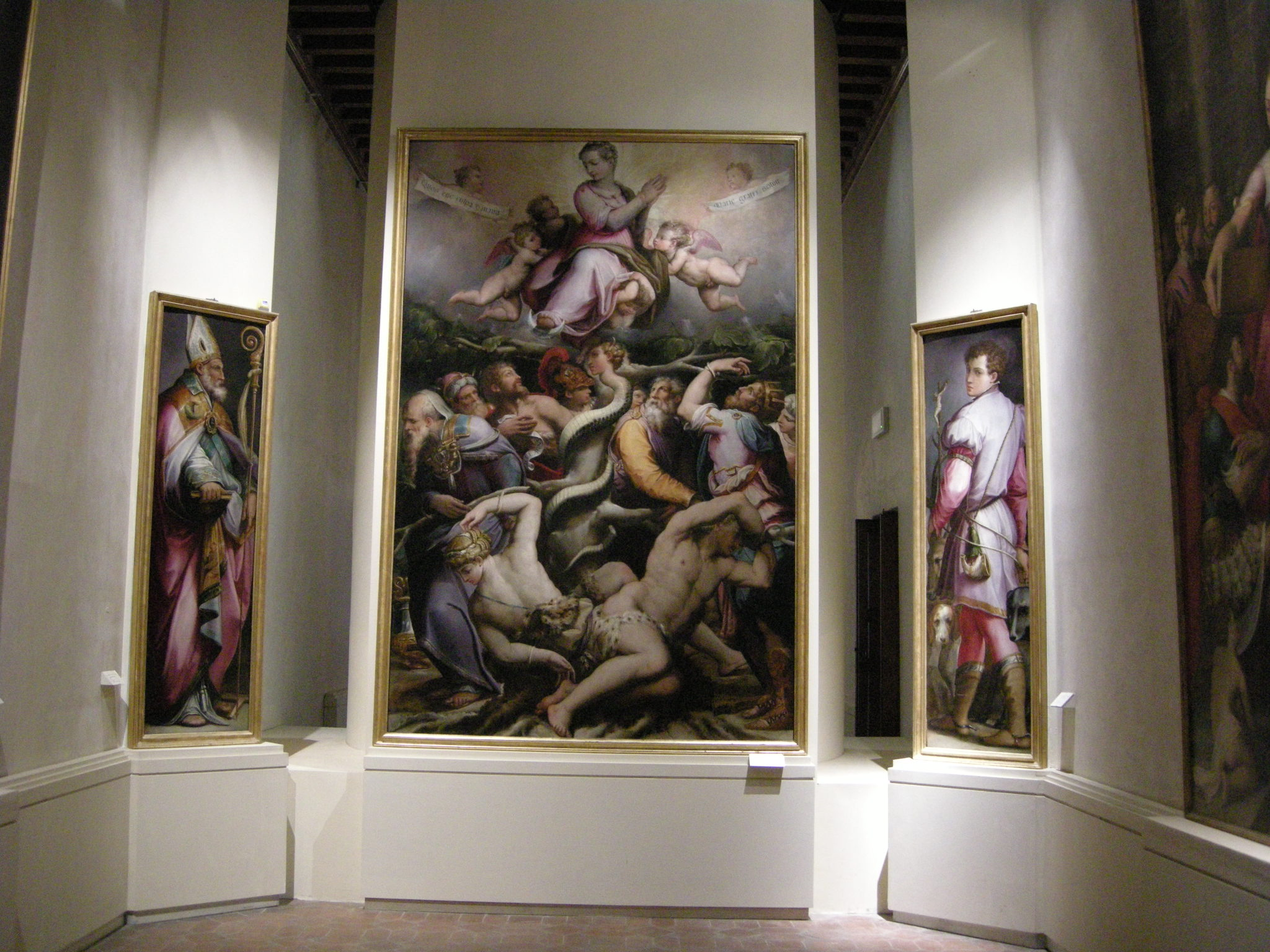 Giorgio vasari, 1543, immacolata concezione (center), s. eustachio (sx) e san Biagio (dx)